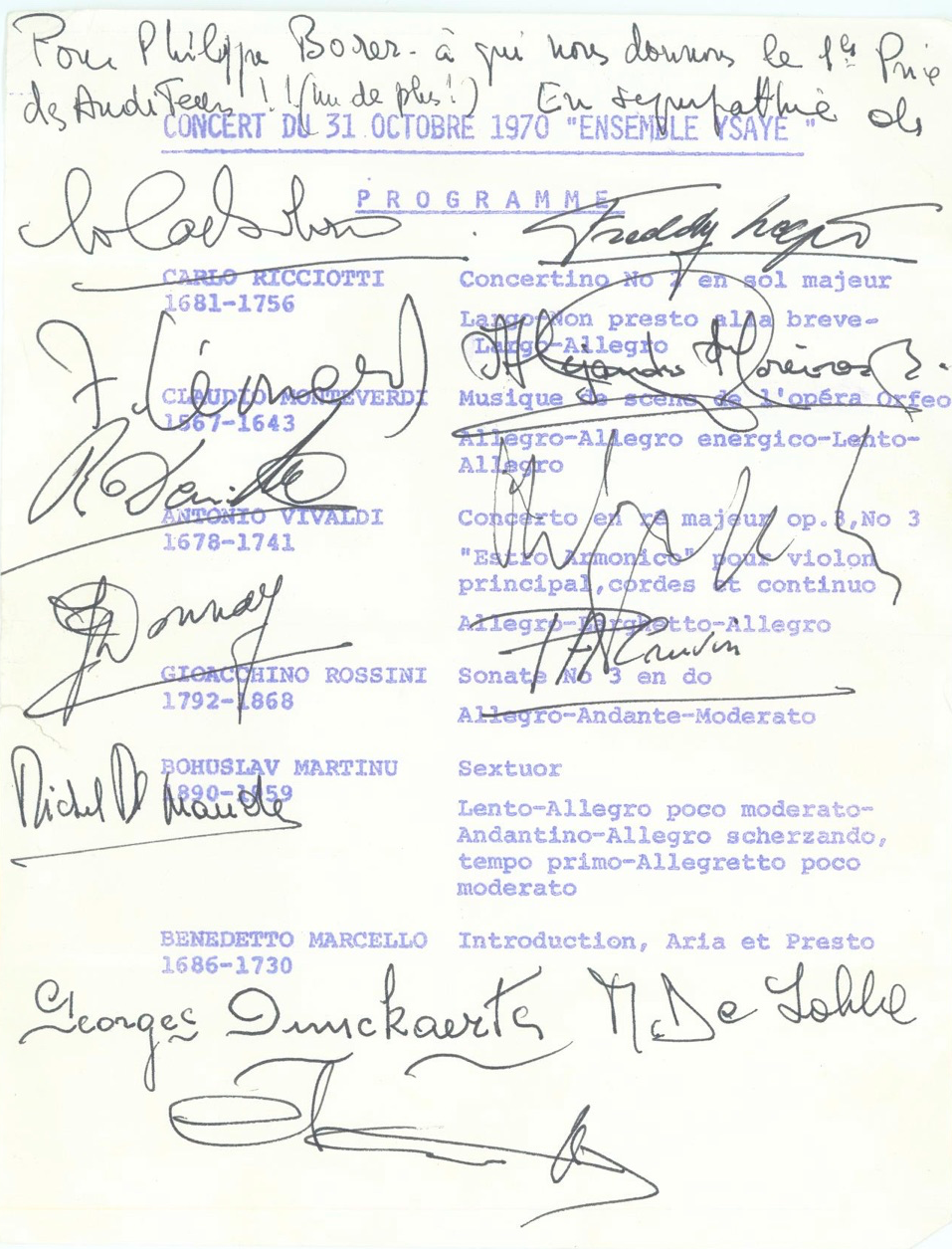 Programma di sala autografato del concerto tenuto il 31 ottobre 1970 a Neuchâtel dall’ “Ensemble Ysaÿe” diretto da Lola Bobescu